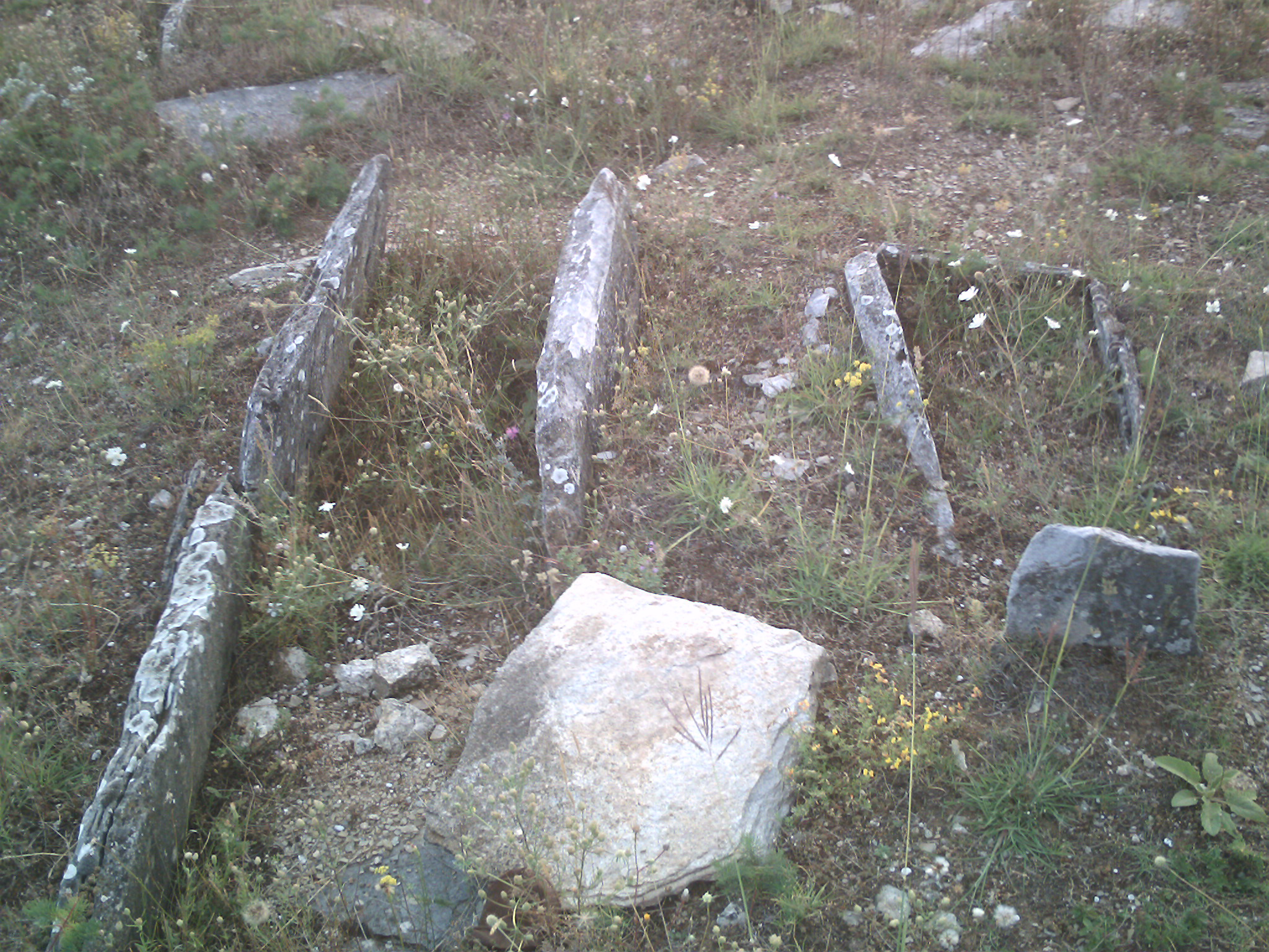 Некрополът край село Туховища открит през 80-те.